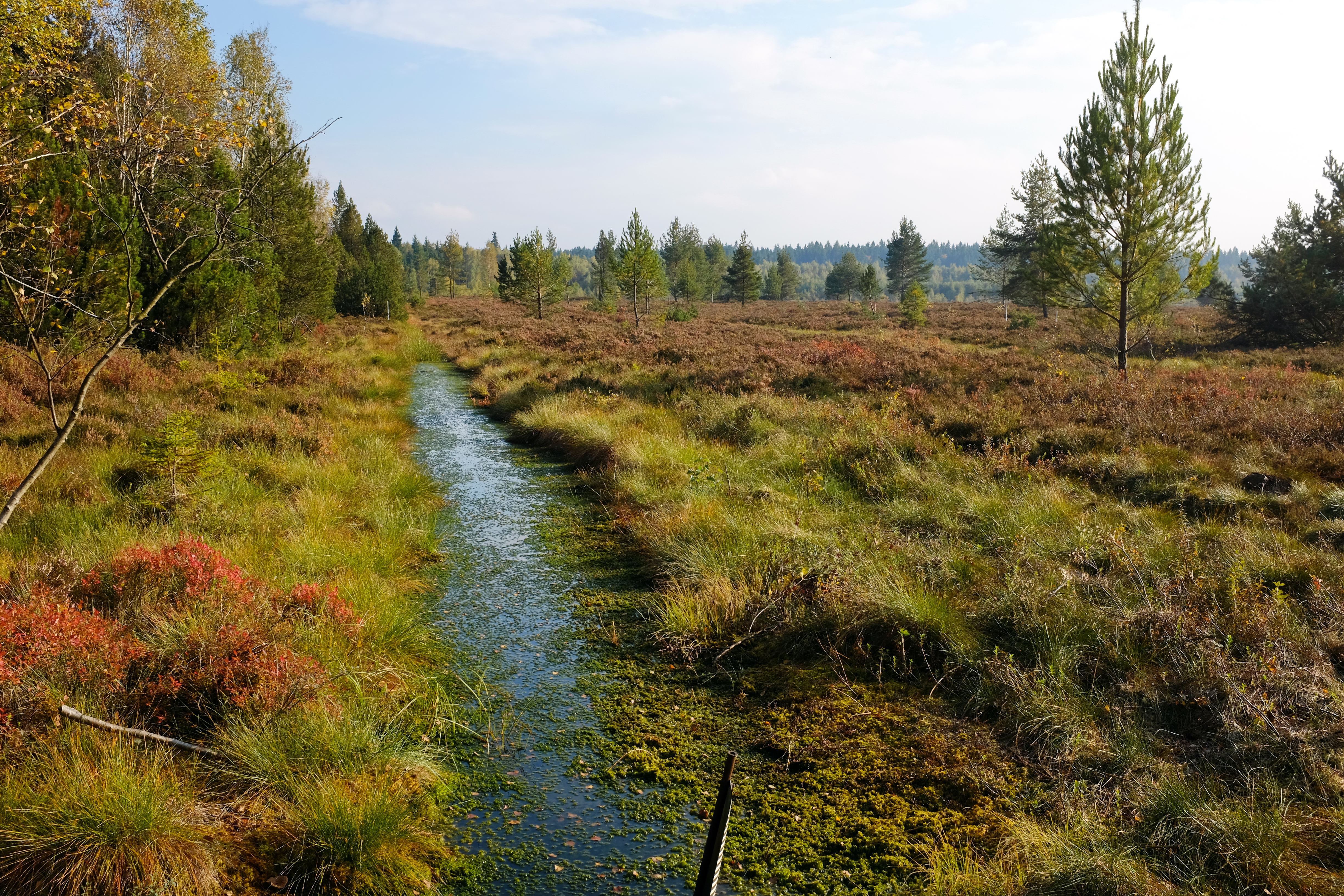 Evropsky významná lokalita - Krásenské rašeliniště - Slavkovský les, okres Sokolov